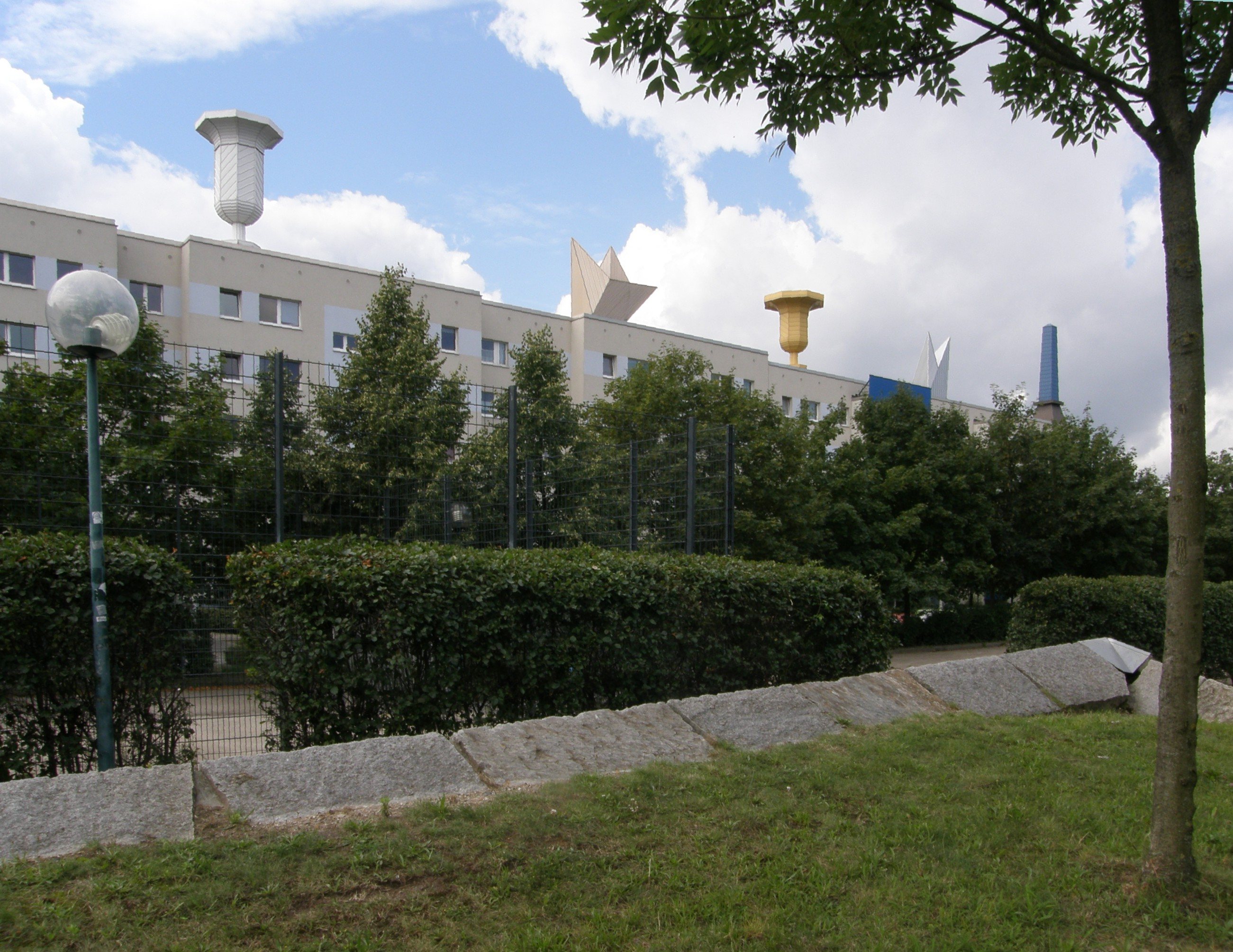 Hellersdorf, Zossener Straße: Auf dem Dach Stahlskelettskulpturen eines litauischen Künstlers; 1998